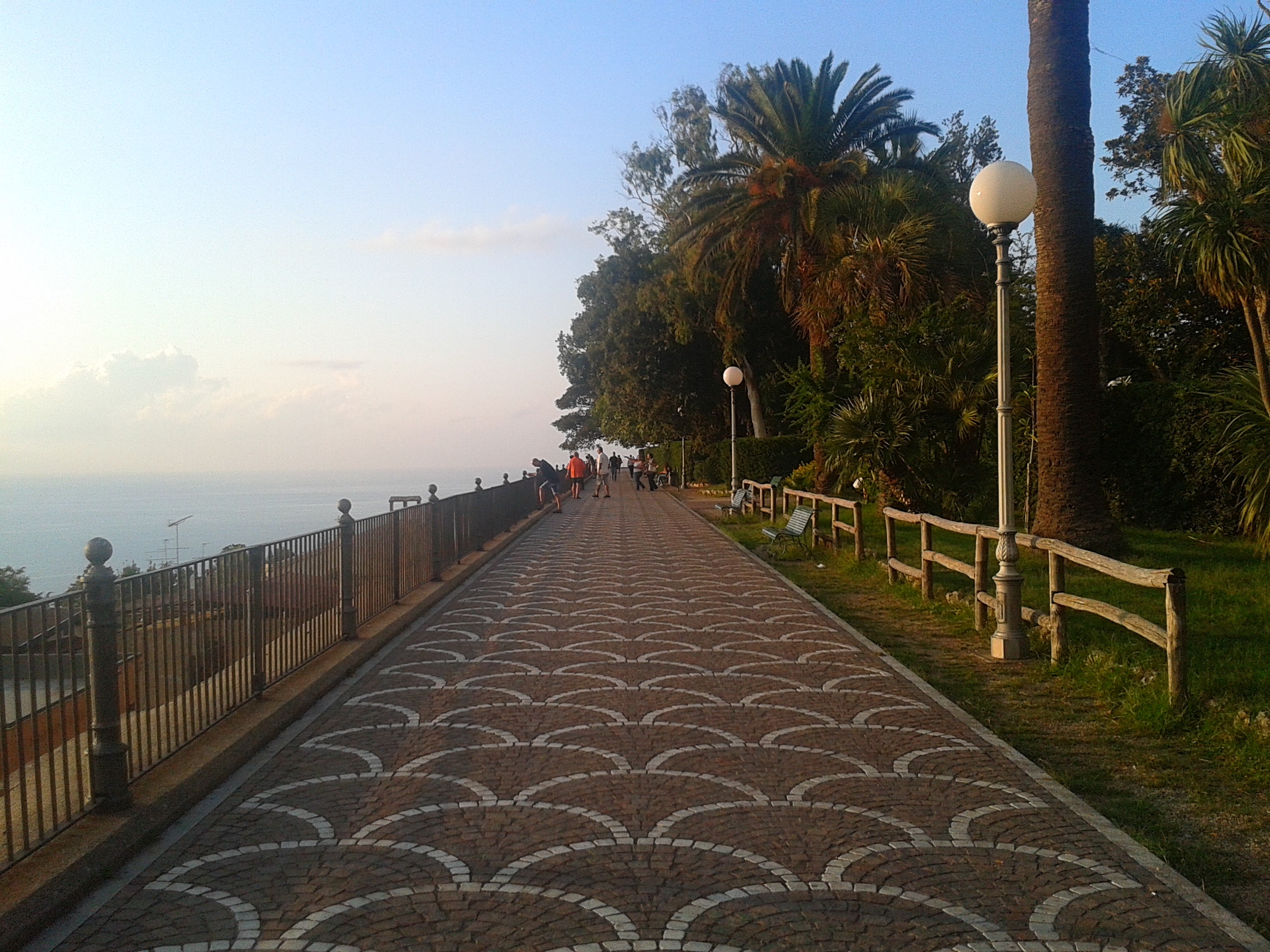 Affaccio Villa comunale Palmi